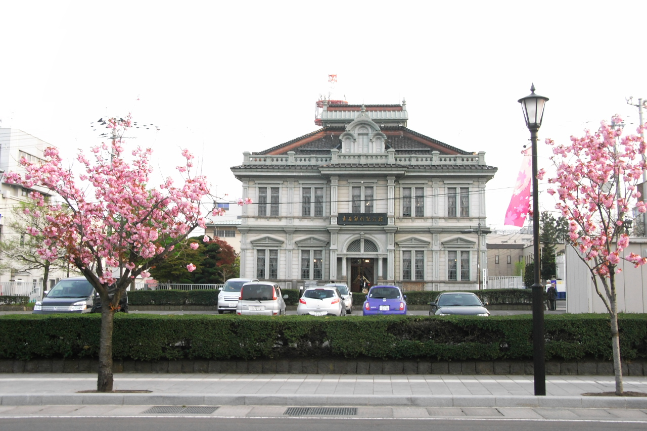 弘前城と弘前駅の間にある明治期の建物で、旧第五十九銀行本店だった建物。現在は青森銀行記念館として一般公開されている。時間がなかったので素通り。